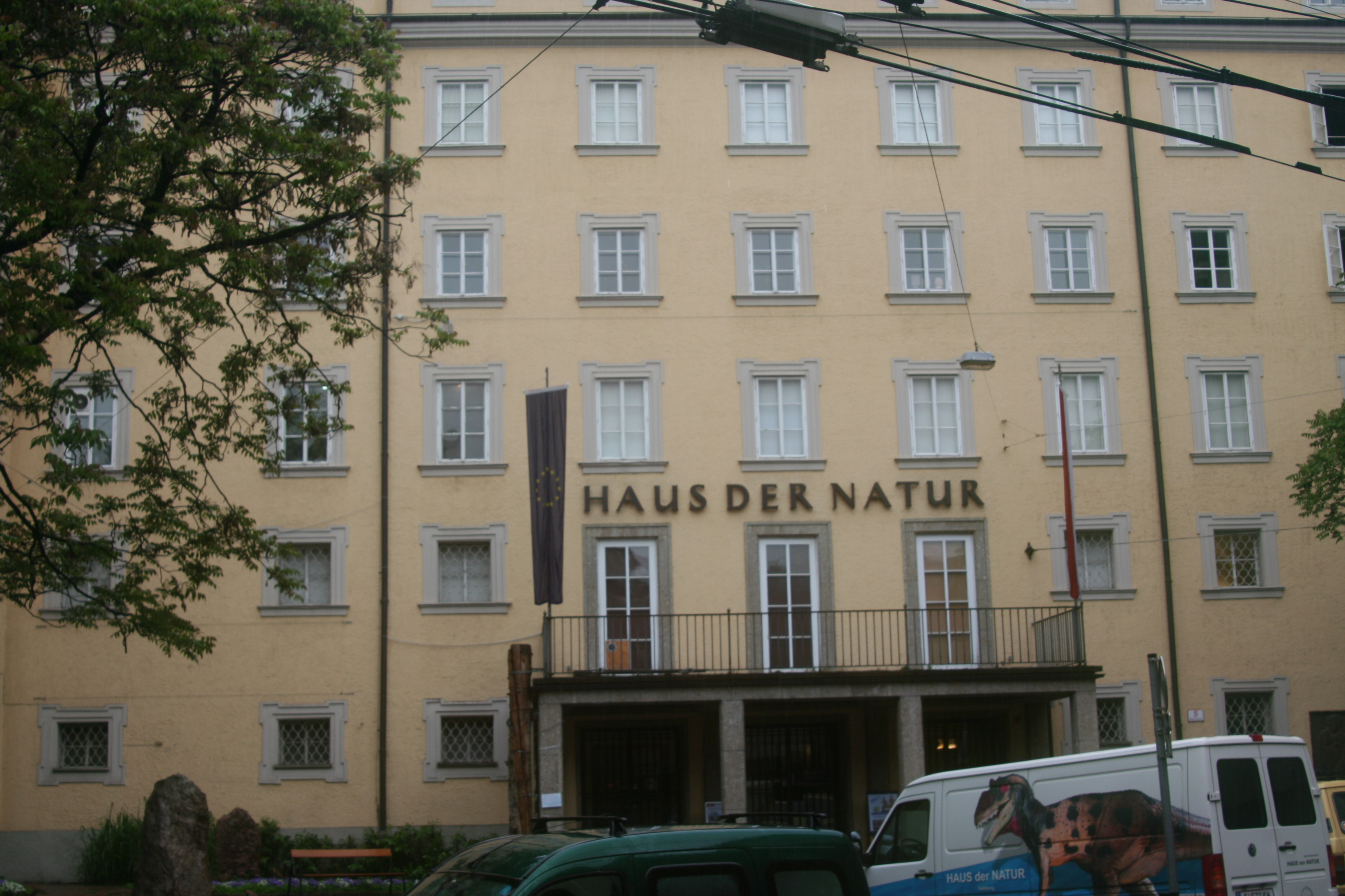 Haus der Natur